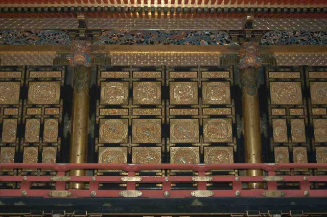 Info in de Metadata